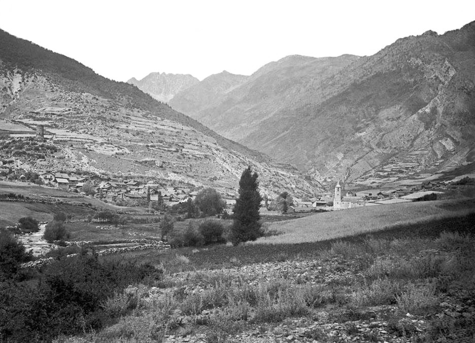 Imatge